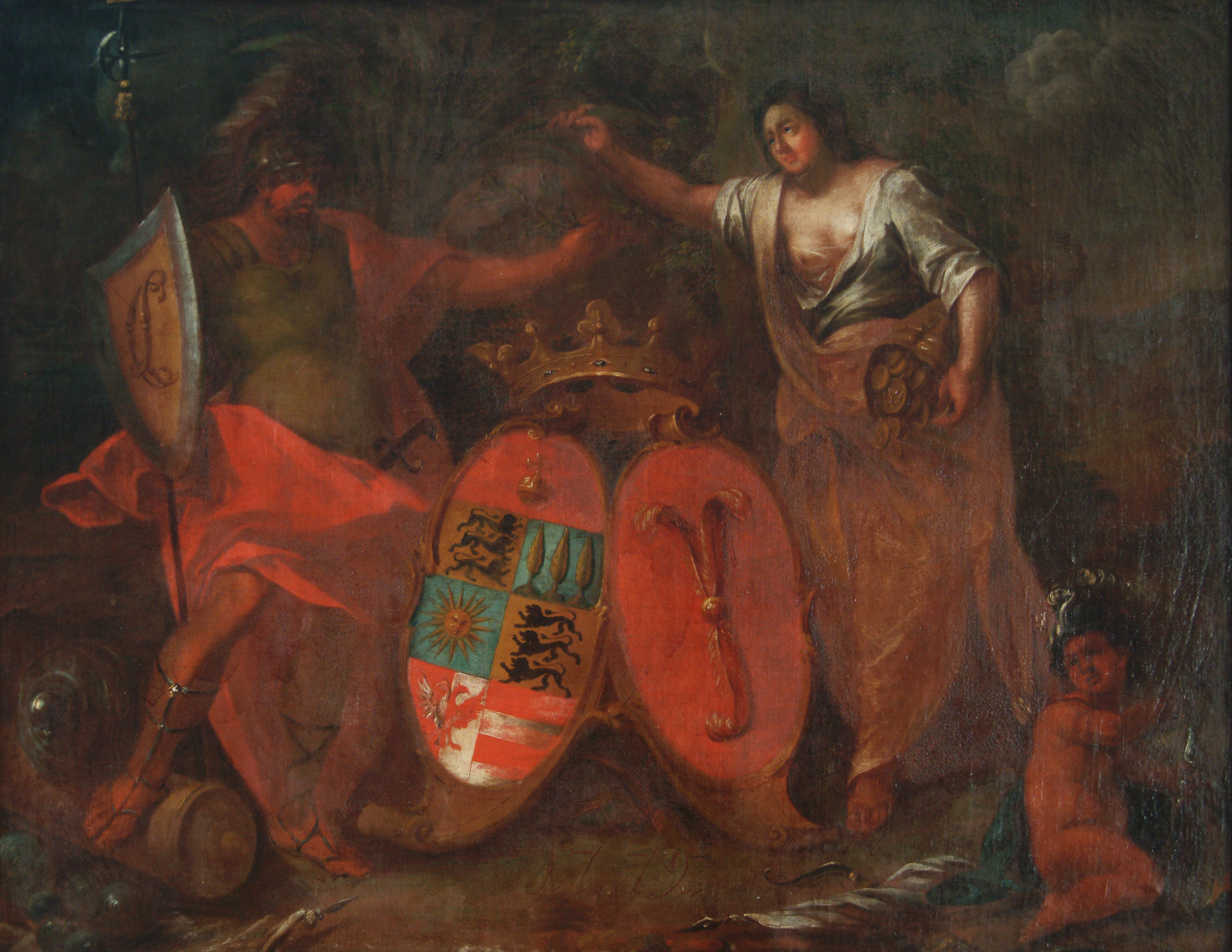 Allianzwappen Waldburg mit Harrach, von einem Gemälde im Palast Hohenems, datiert 1779